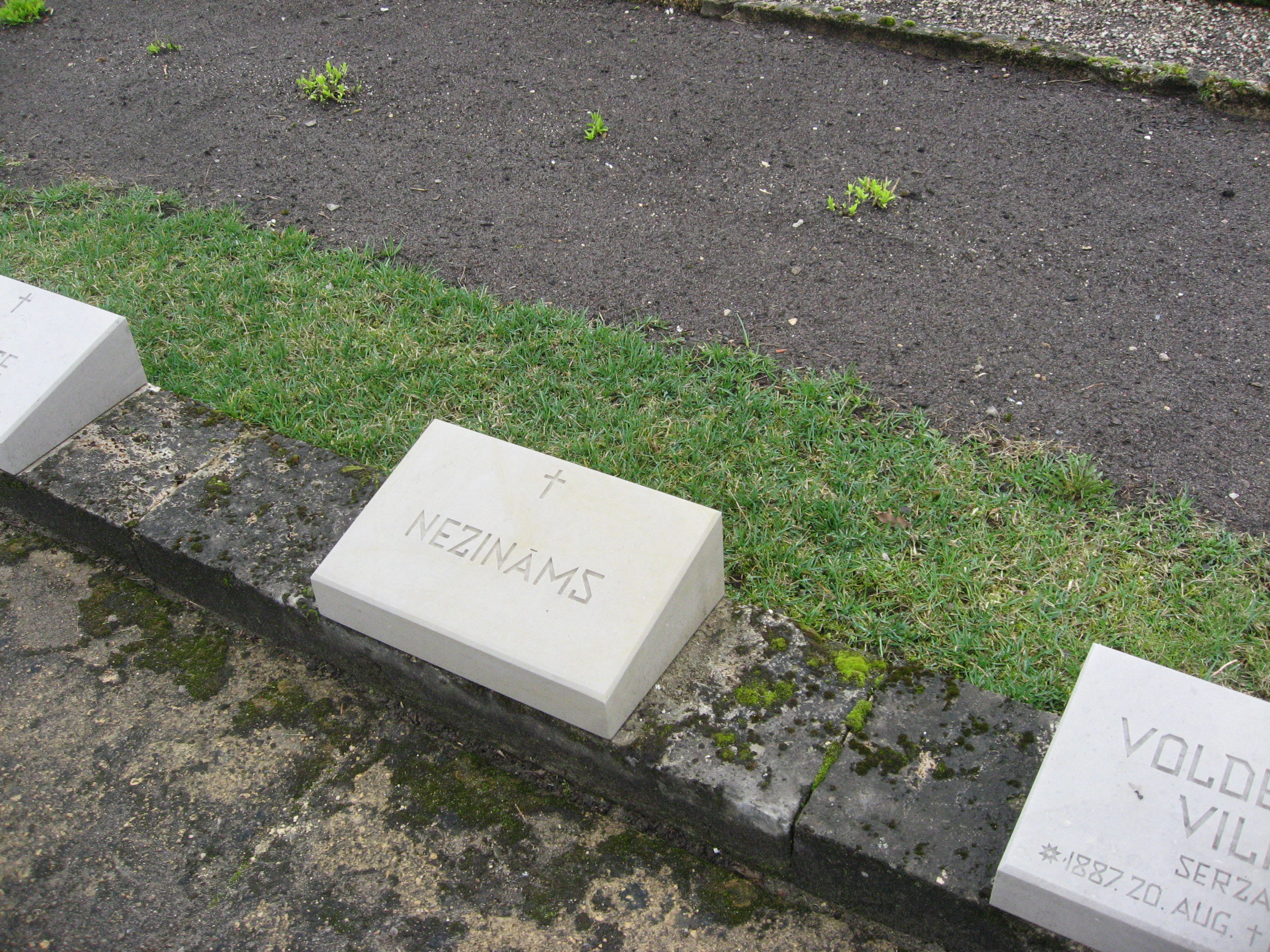 Brāļu kapi, Rīga